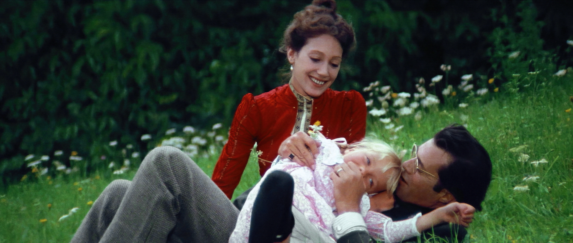 Képkocka a „Halál Velencében” című filmből